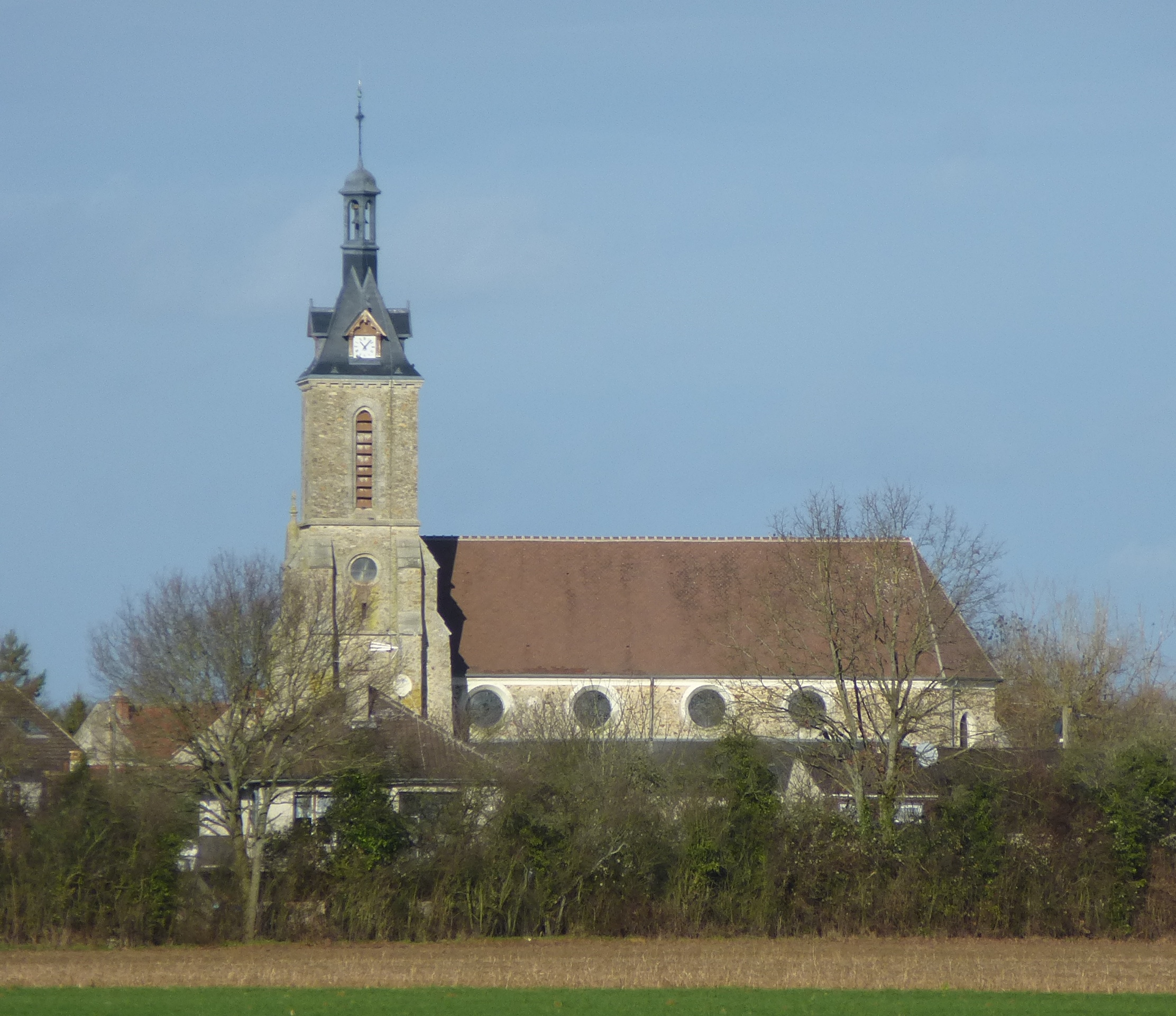 Église Saint-Leu-et-Saint-Gilles de Neufmoutiers-en-Brie. (Seine-et-Marne, région Île-de-France).